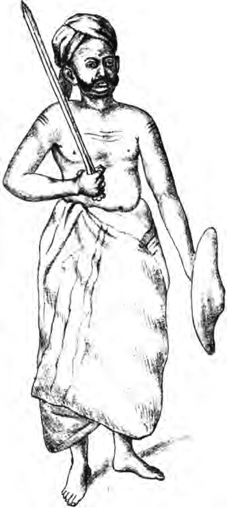 An Ettu Veetil Pillay